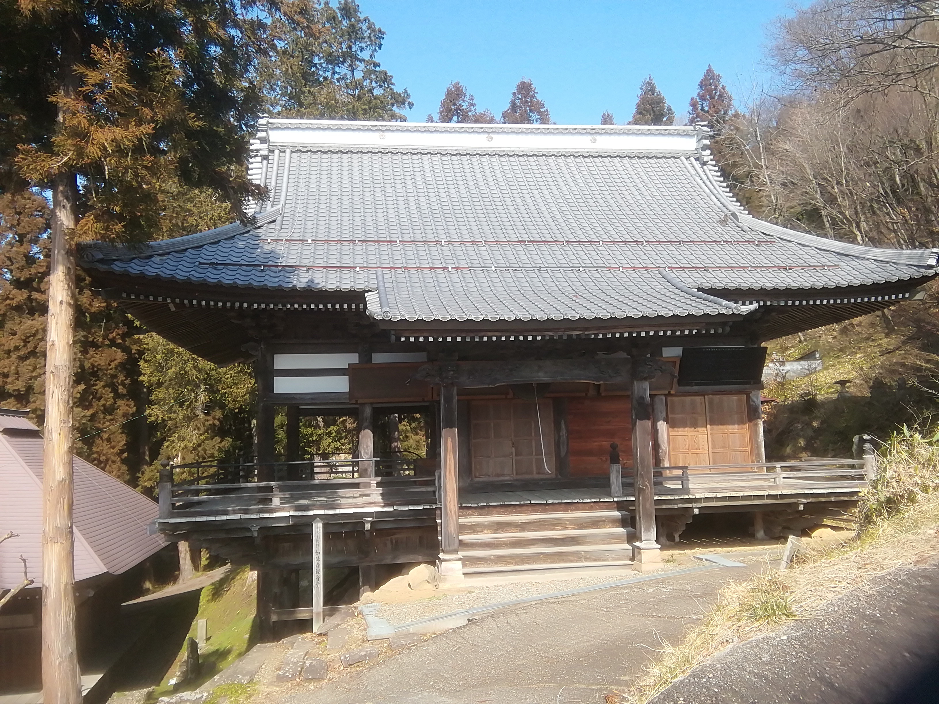 如法寺観音堂